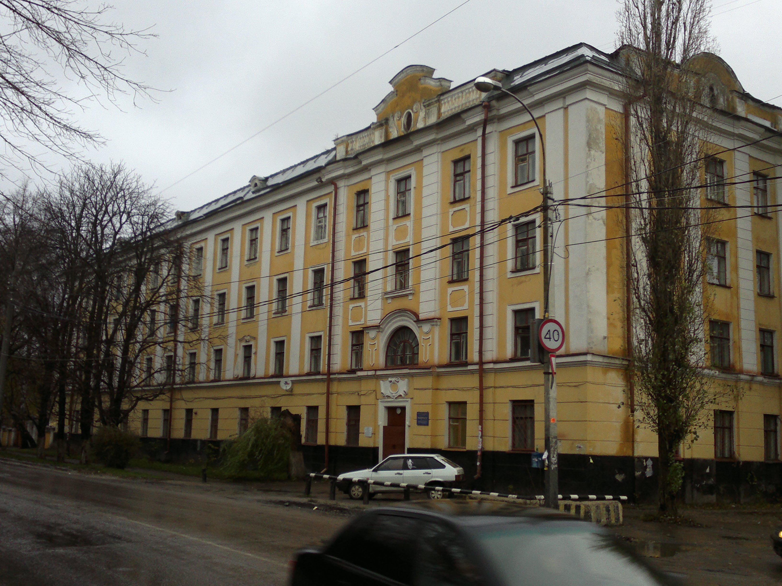 Общежитие №1. Фото сделано 31 октября 2012 года